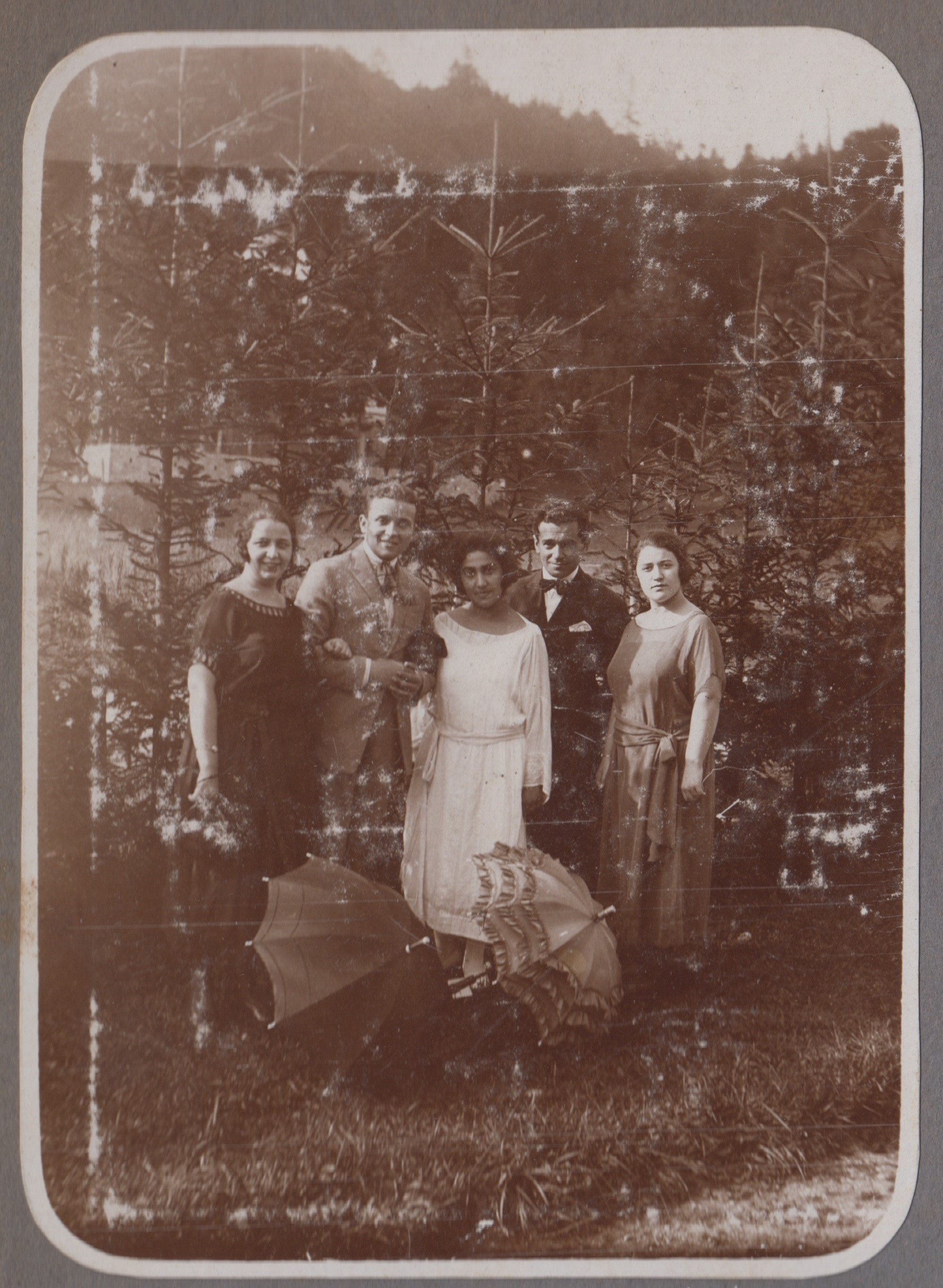 Paradesi Jews of Madras at EIC garden